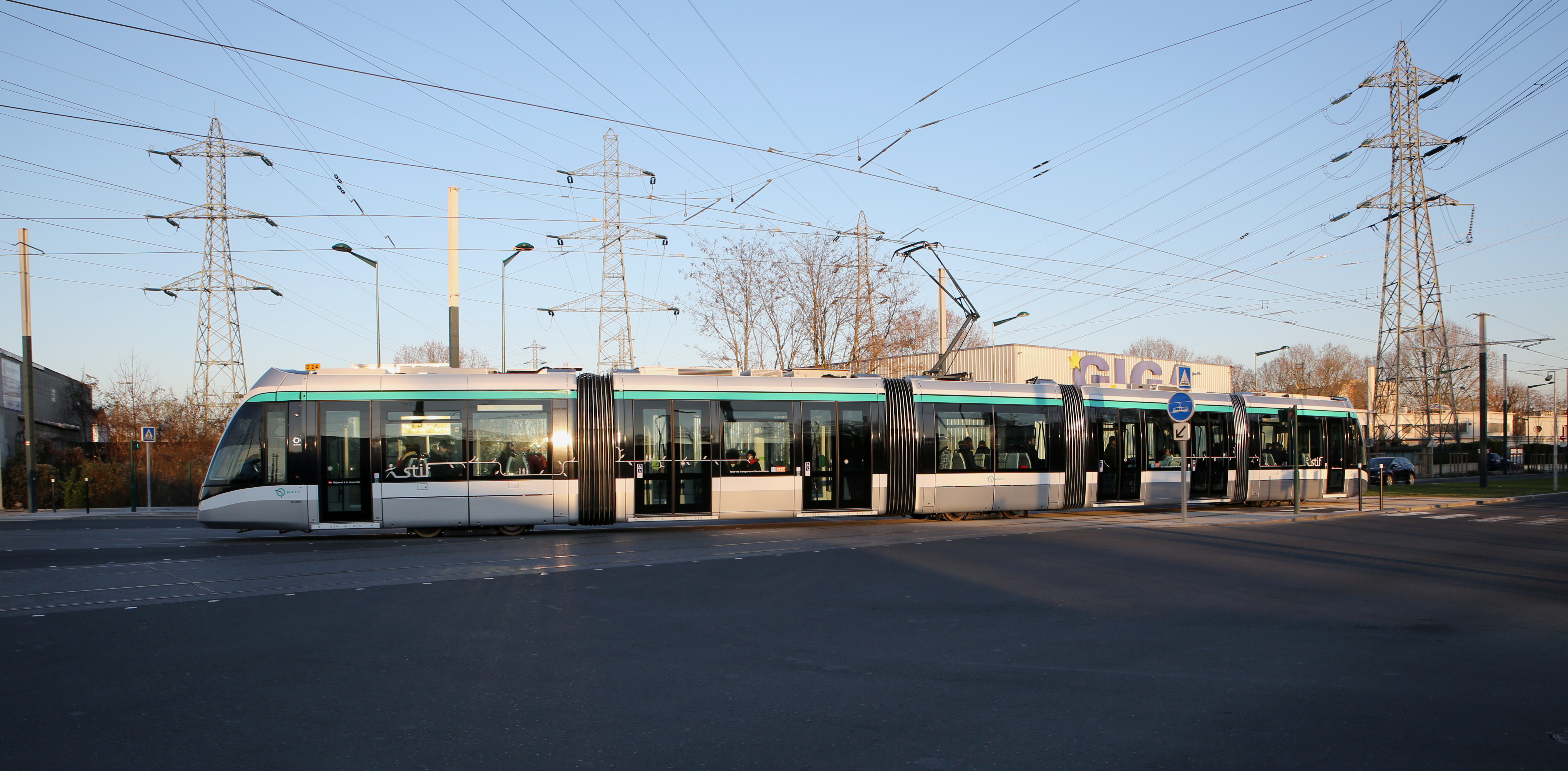 Tram T8 en provenance de Villetaneuse rejoignant le tronc commun.